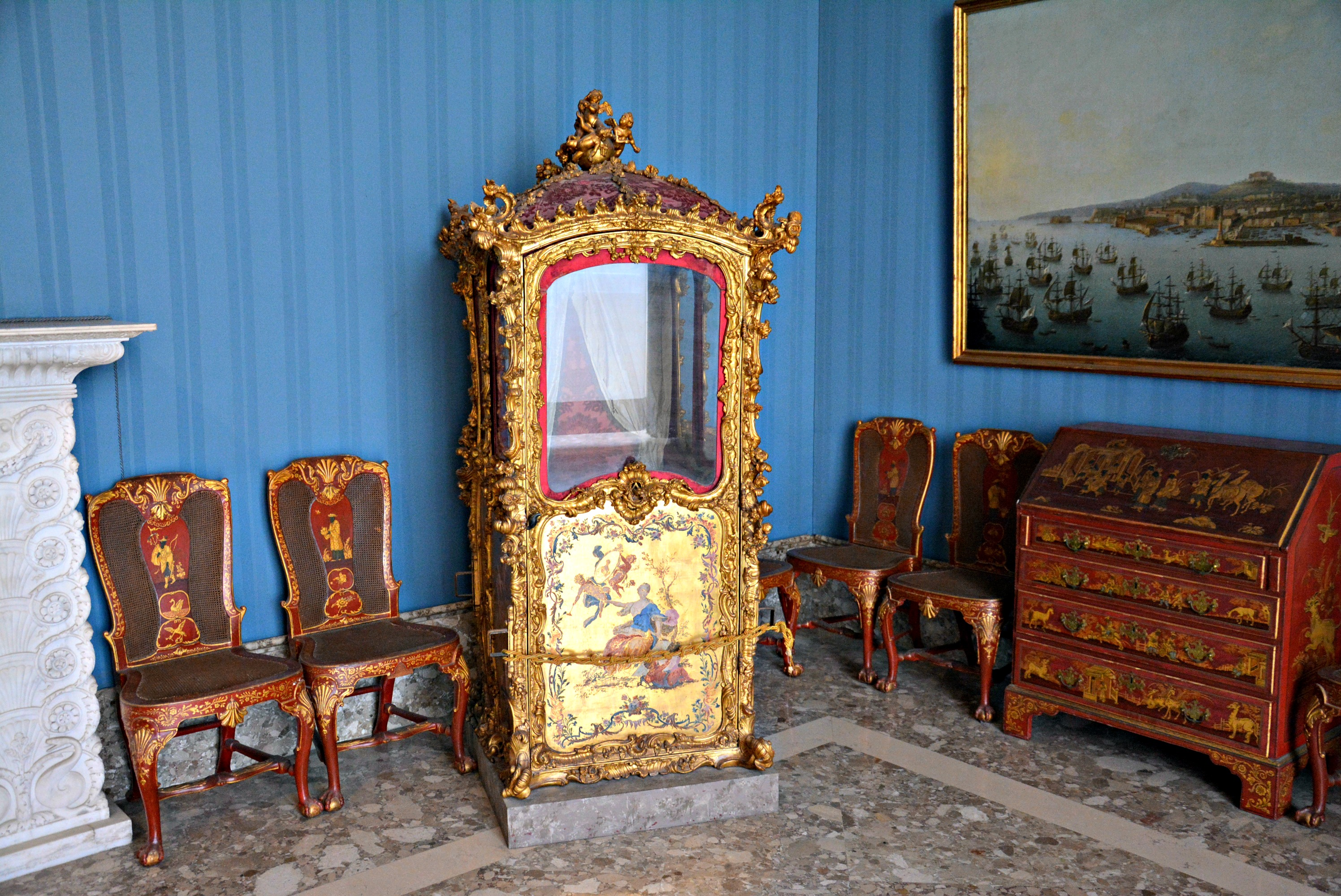 Vedi titolo